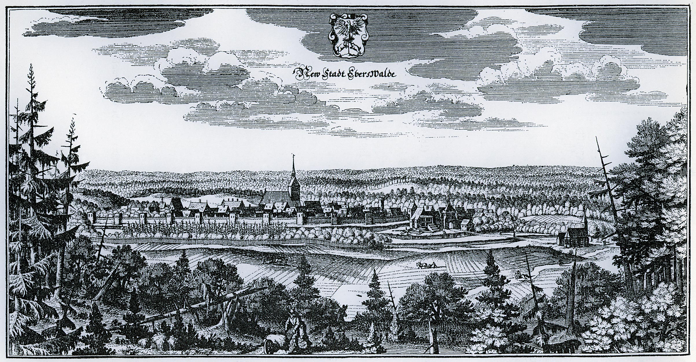 Eberswalde. - Gesamtansicht, Historische Ortsansicht. Signatur unten (links von der Schubkarre) Cas. Meri..fec.(it)